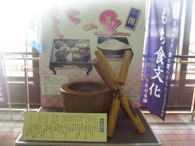 一関市の郷土料理・餅を宣伝するディスプレー